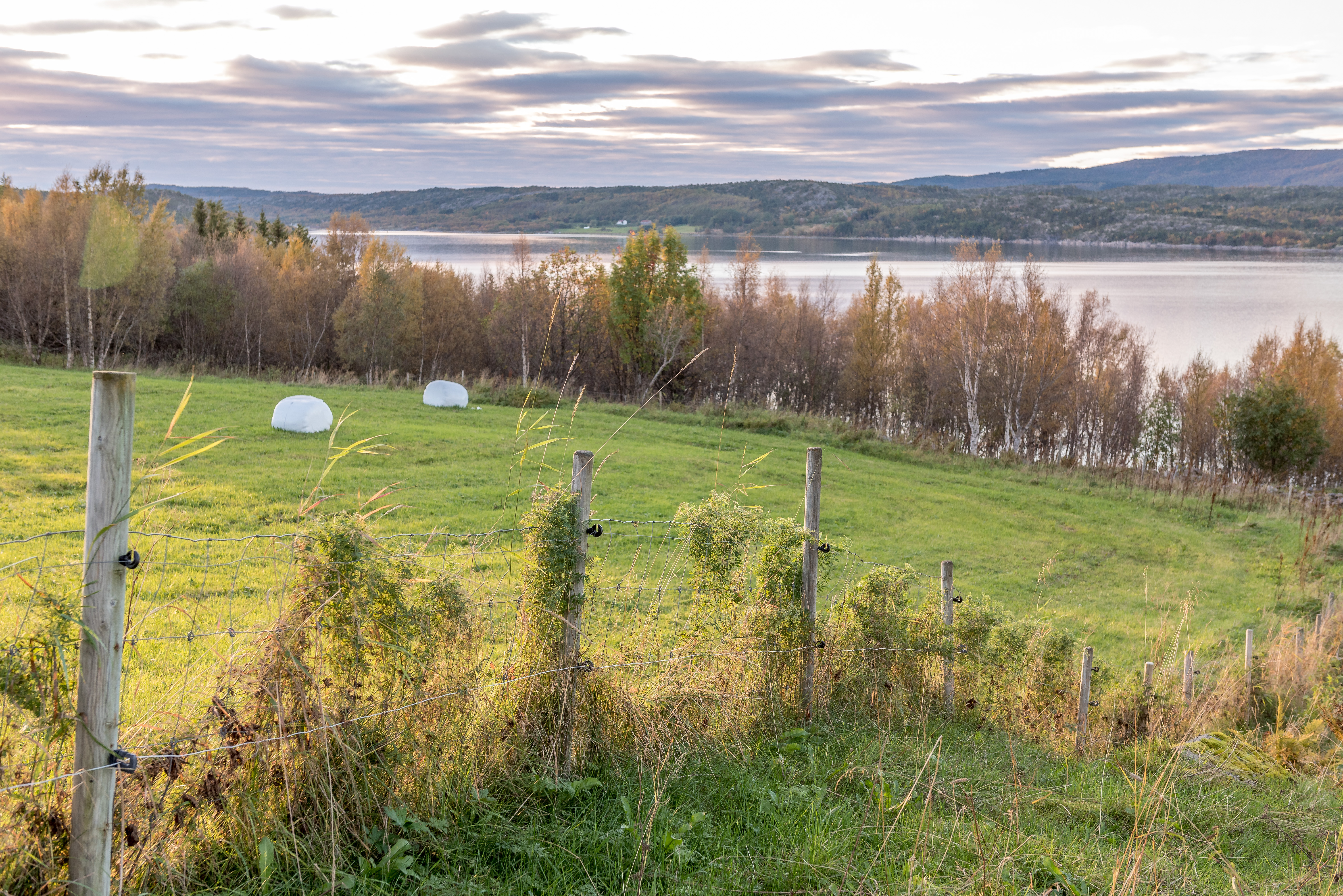 lilandsfjorden utsikt over